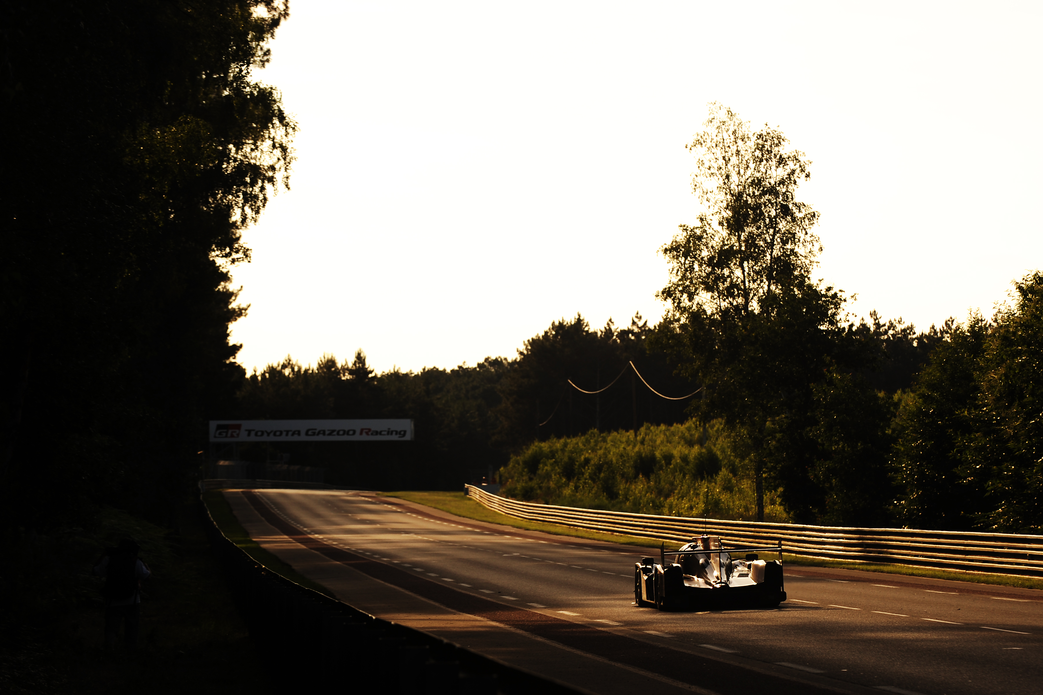 United Autosport lors des 24 Heures du Mans 2018.